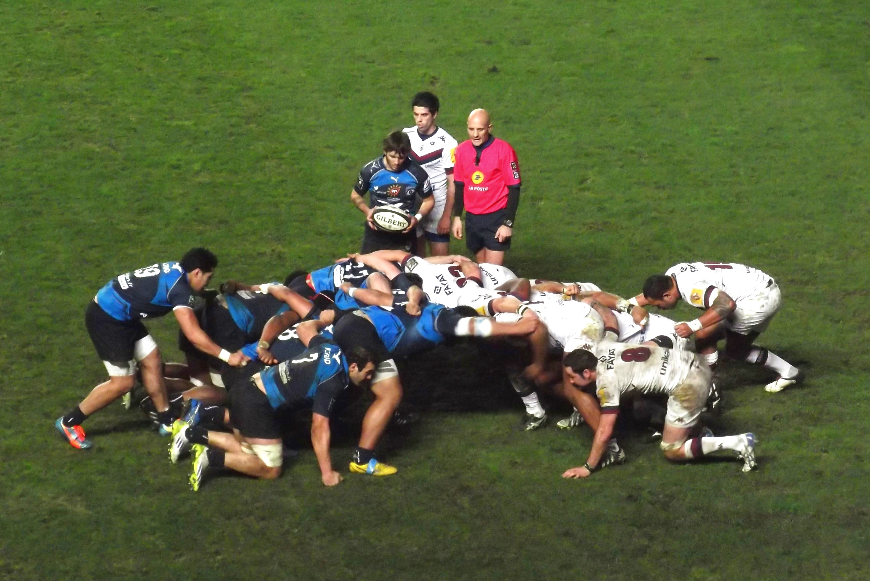 MHR-UBB (28-23), 25 janvier 2014.